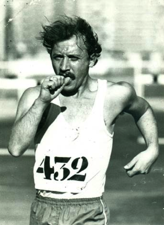 Agustí Jorba Argentí en una de sus marchas atléticas en los años 70.